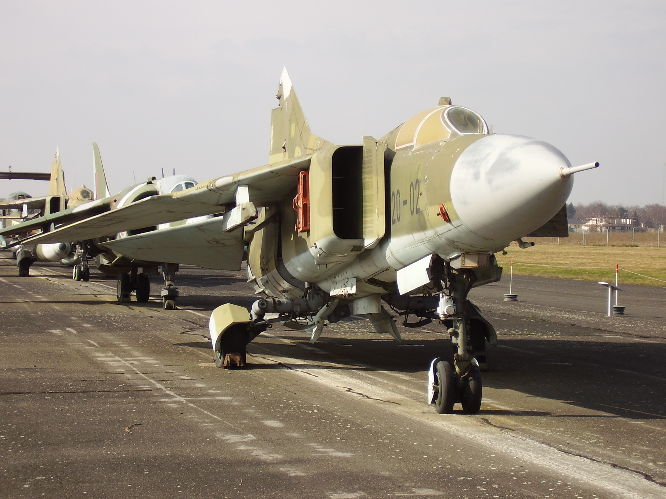 Luftwaffenmuseum der Bundeswehr; Airforce Museum of the Bundeswehr; Berlin-Gatow